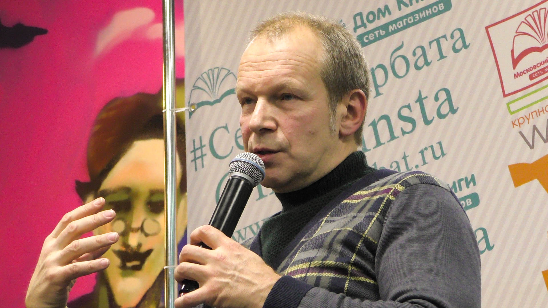 03.02.2017. Московский Дом Книги.